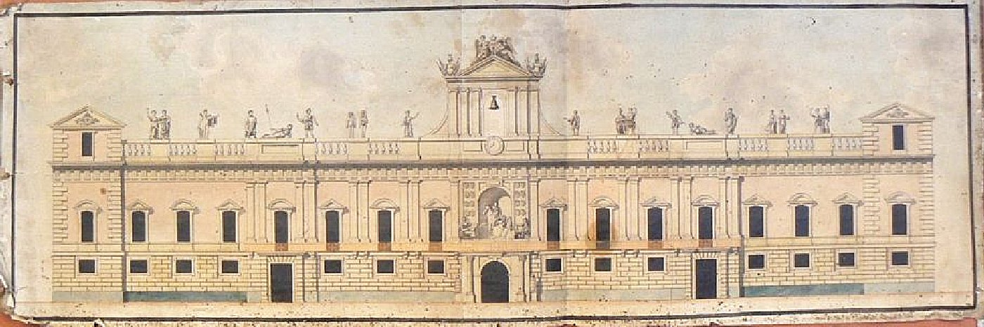 Projet non réalisé de Jean-Pierre Rivalz pour la façade du Capitole de Toulouse au 17ème siècle.